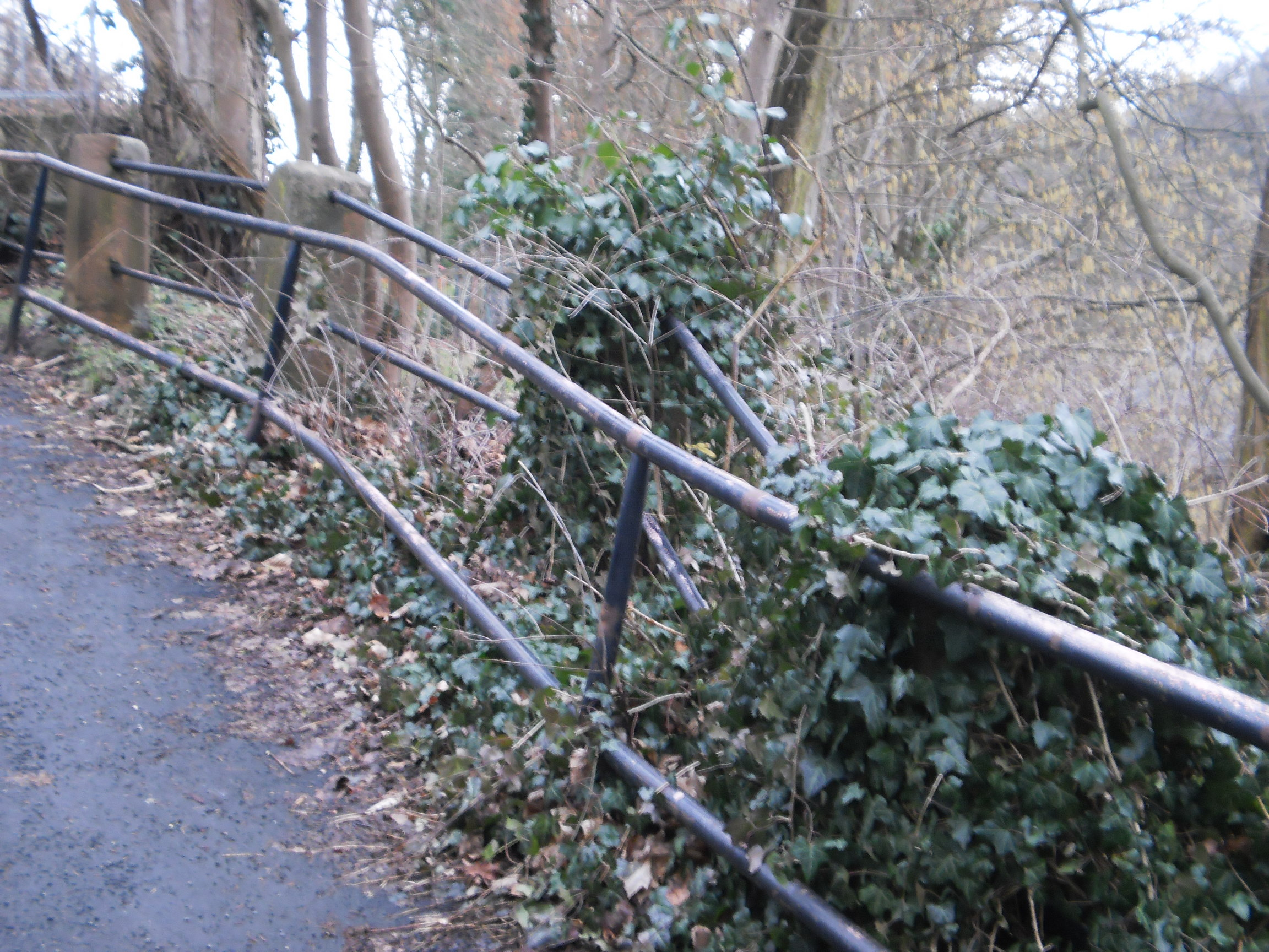 Zweites Geländer (mehr Sicherheit durch Redundanz) zusätzlich zur etwas instabilen historischen Absturzsicherung oberhalb der Wilhelm-Roser-Strasse in Marburg (5. März 2016).